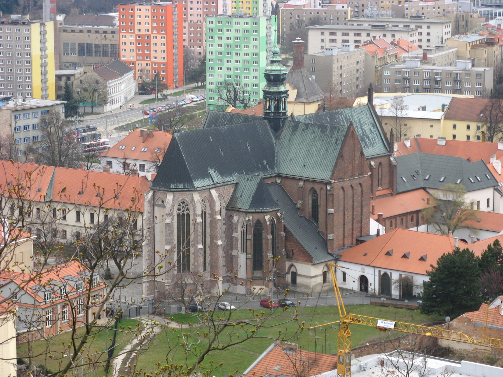 Bazilika nanebevzetí panny Marie - pohled (foceno) z hradu Špilberk